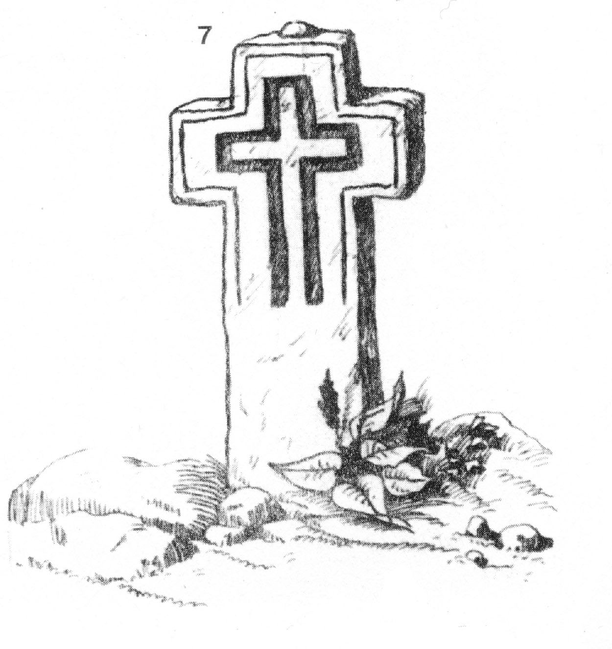 7. Кръст-оброк, из землището на с. Вълчек - с. Макреш, Видинско, местност Церият. Посветено на Успение Пресвета Богородици -15/28 август. Забит е всред дъбрава от големи брястове. Издялан е грубо от сив точилен камък, обрасъл в мъхове. Четирикрилен; горното му крило завършва с ябълка. Върху лицето е издълбан кръст, заобиколен с дълбоко и широко гравирана линия. По техника и форма не е по-стар от Освободителната война. Размери: 135x51x13 см. Скициран на 10.VIII.1930 г.(Т. 13, обр. 8.)